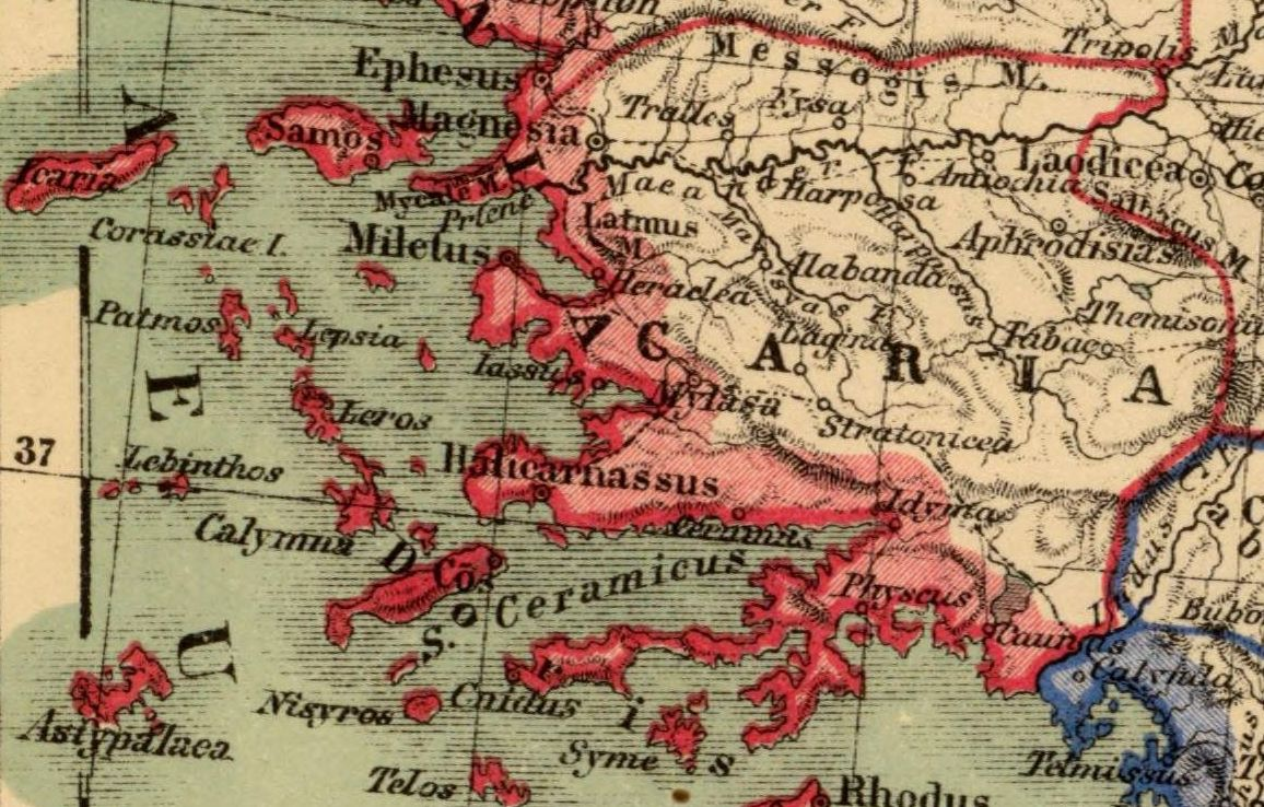 Caria. Asia citerior. Auctore Henrico Kiepert Berolinensi. Geographische Verlagshandlung Dietrich Reimer (Ernst Vohsen) Berlin, Wilhemlstr. 29. (1903)